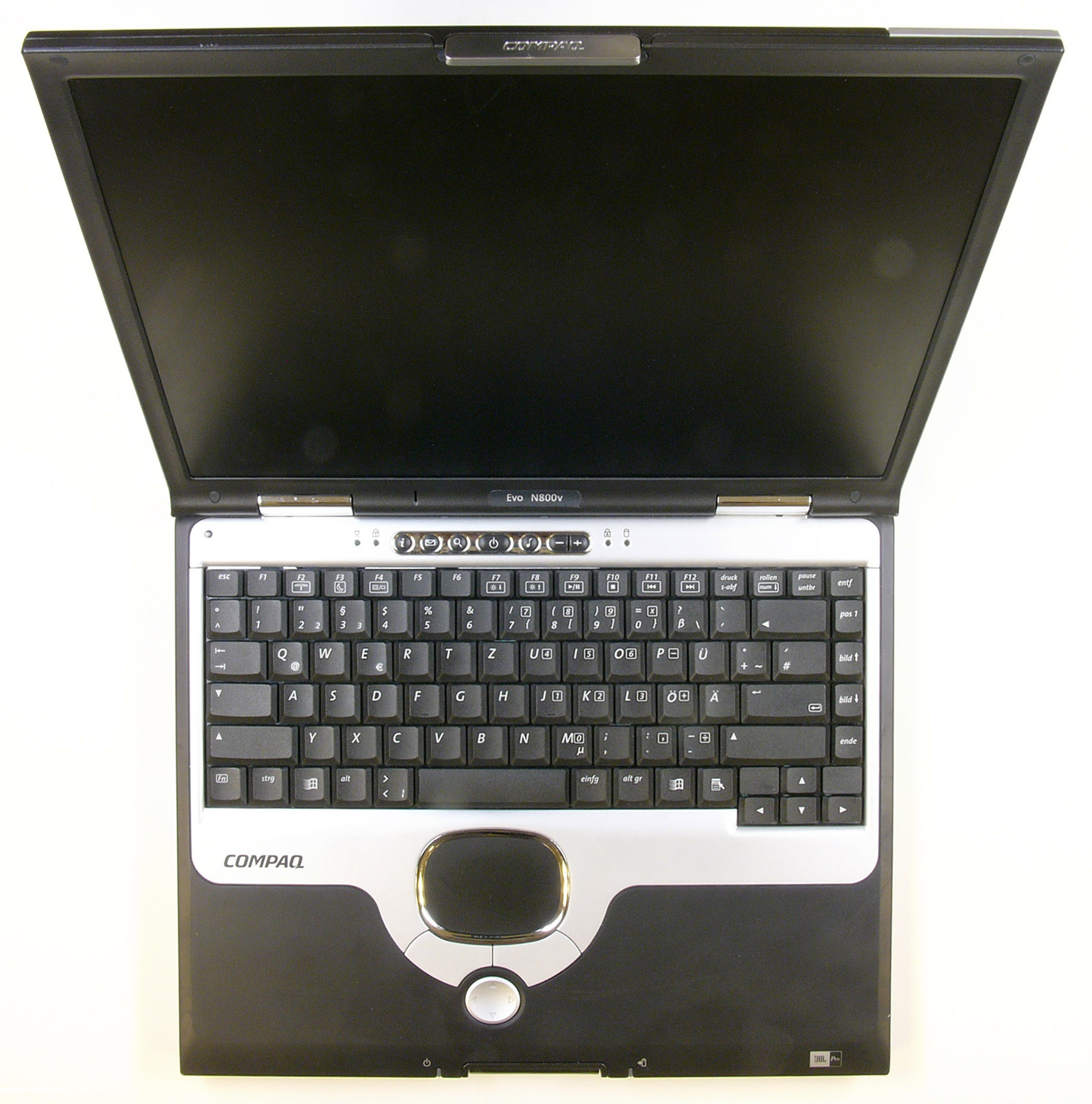 Compaq Evo 800